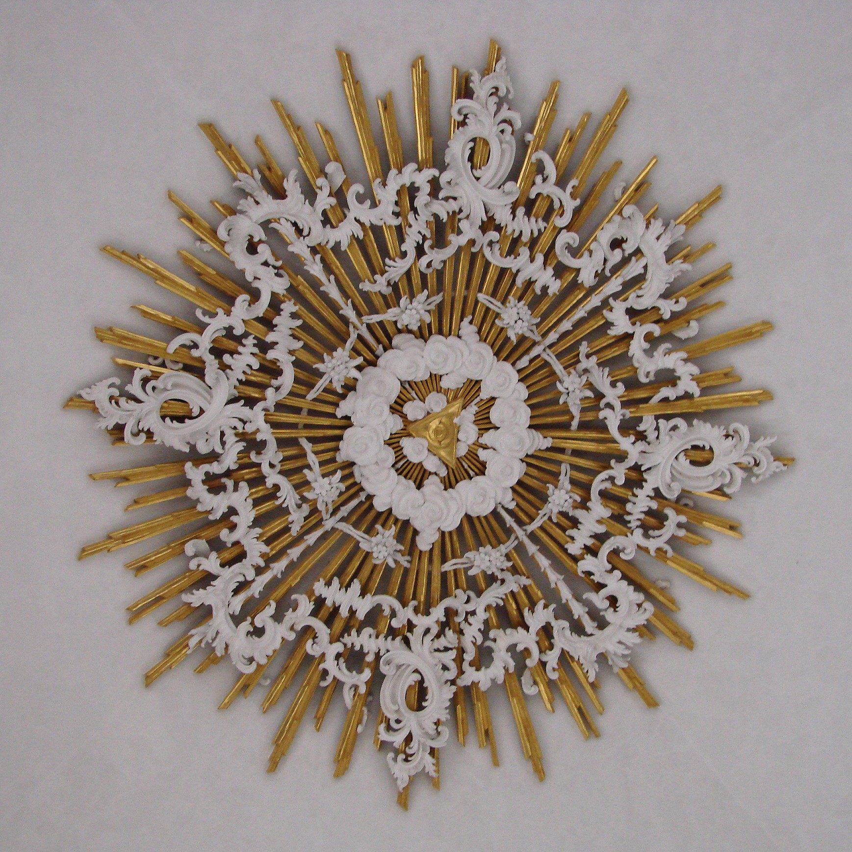 Ludwigskirche in Saarbrücken, Germany: Ornament in the Ceiling